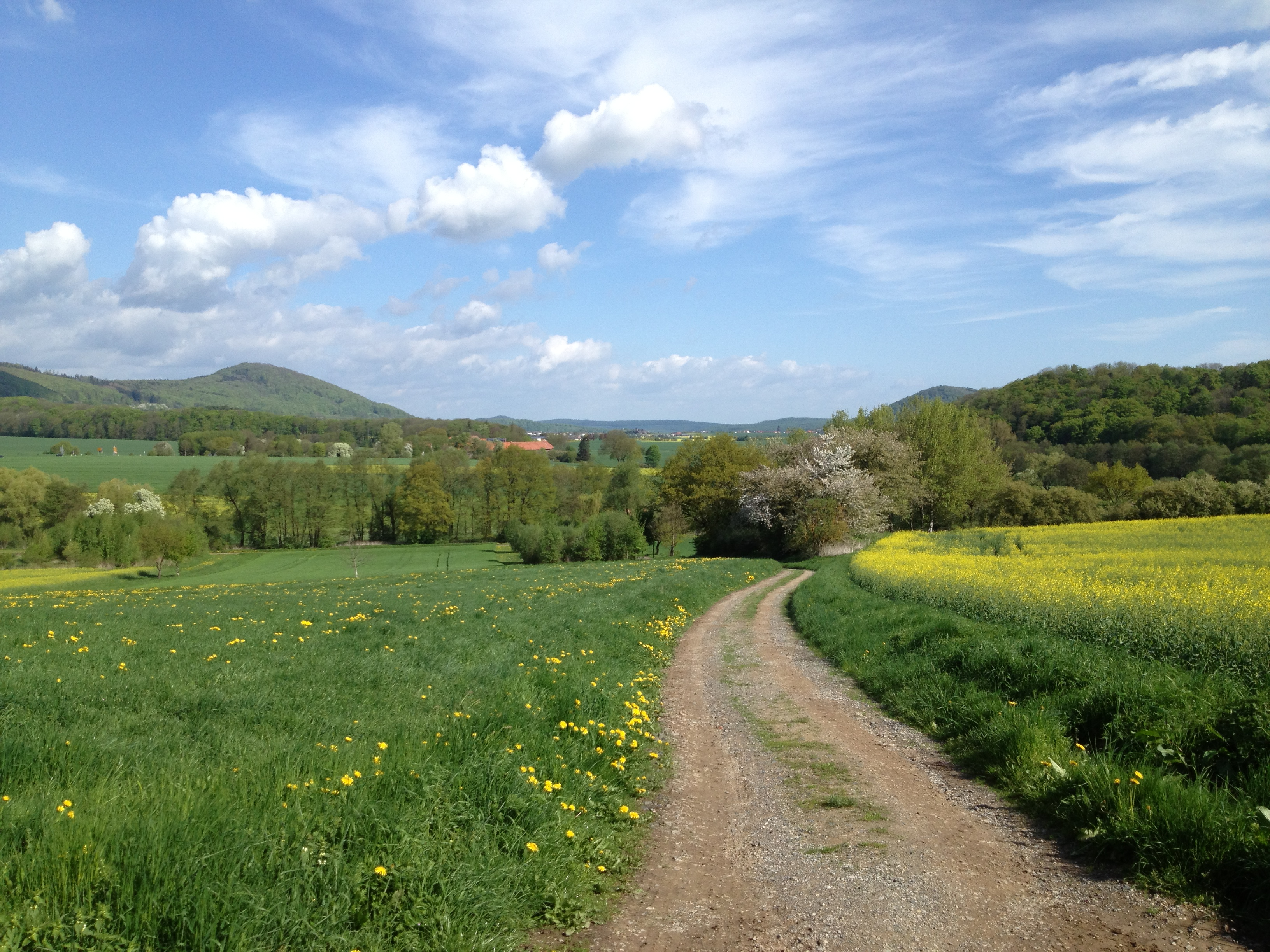 Blick von Ehlen (Warmetalweg, Kassel-Edersee-Radweg) in das Warmetal, in der Mitte Gut Bodenhausen